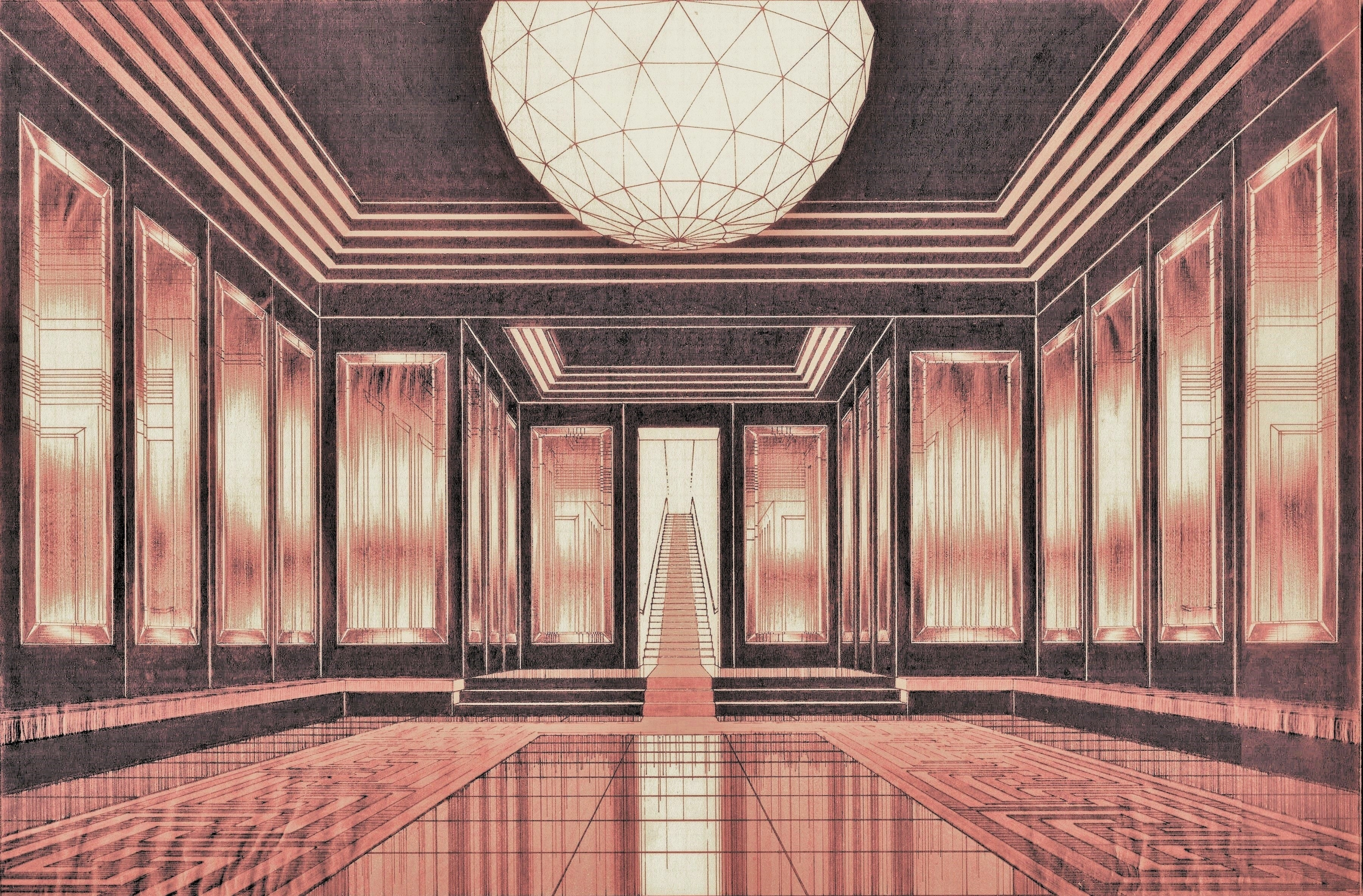 Arnaldo Dell'Ira (1903-1943) Sala d'aspetto per la casa di M.me B. (titolo originale), 1939. Progetto di arredo interno. Inchiostri e pastelli colorati su carta incollata su cartone. Roma, collezione privata.